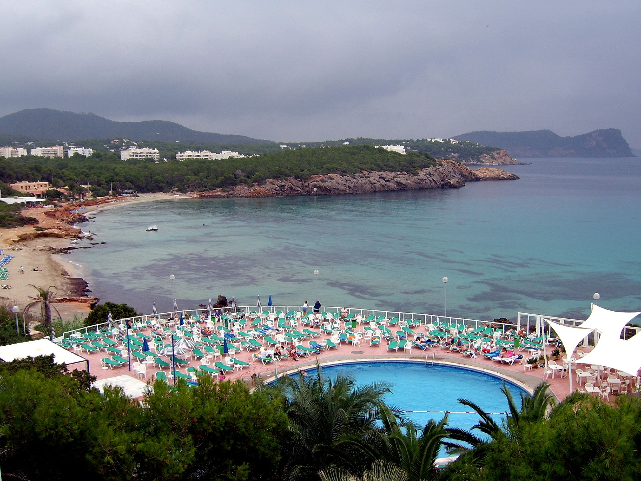 Cala Nova, al nord des Canar, a Santa Eulària des Riu, Eivissa